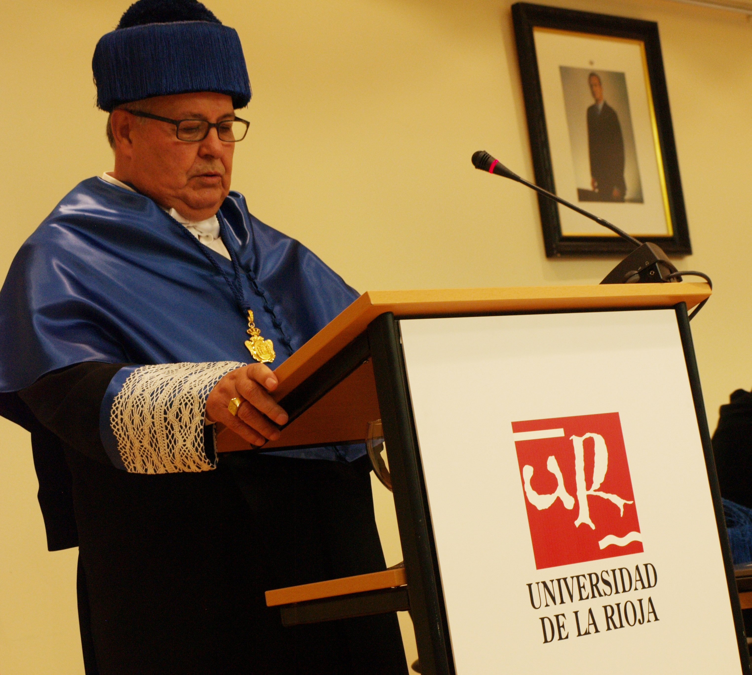 José J. Barluenga.